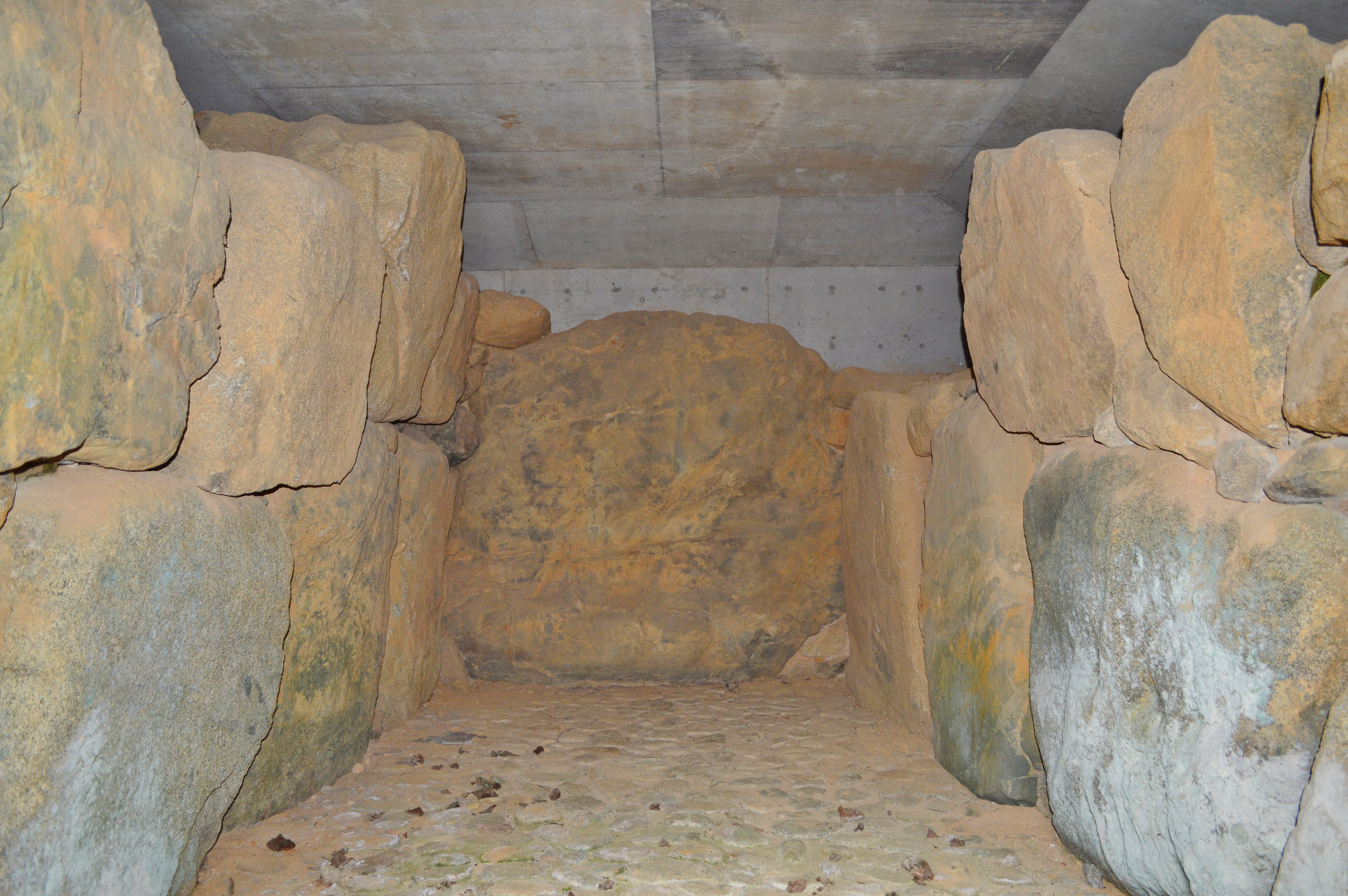 コロコロ山古墳 移築石室玄室